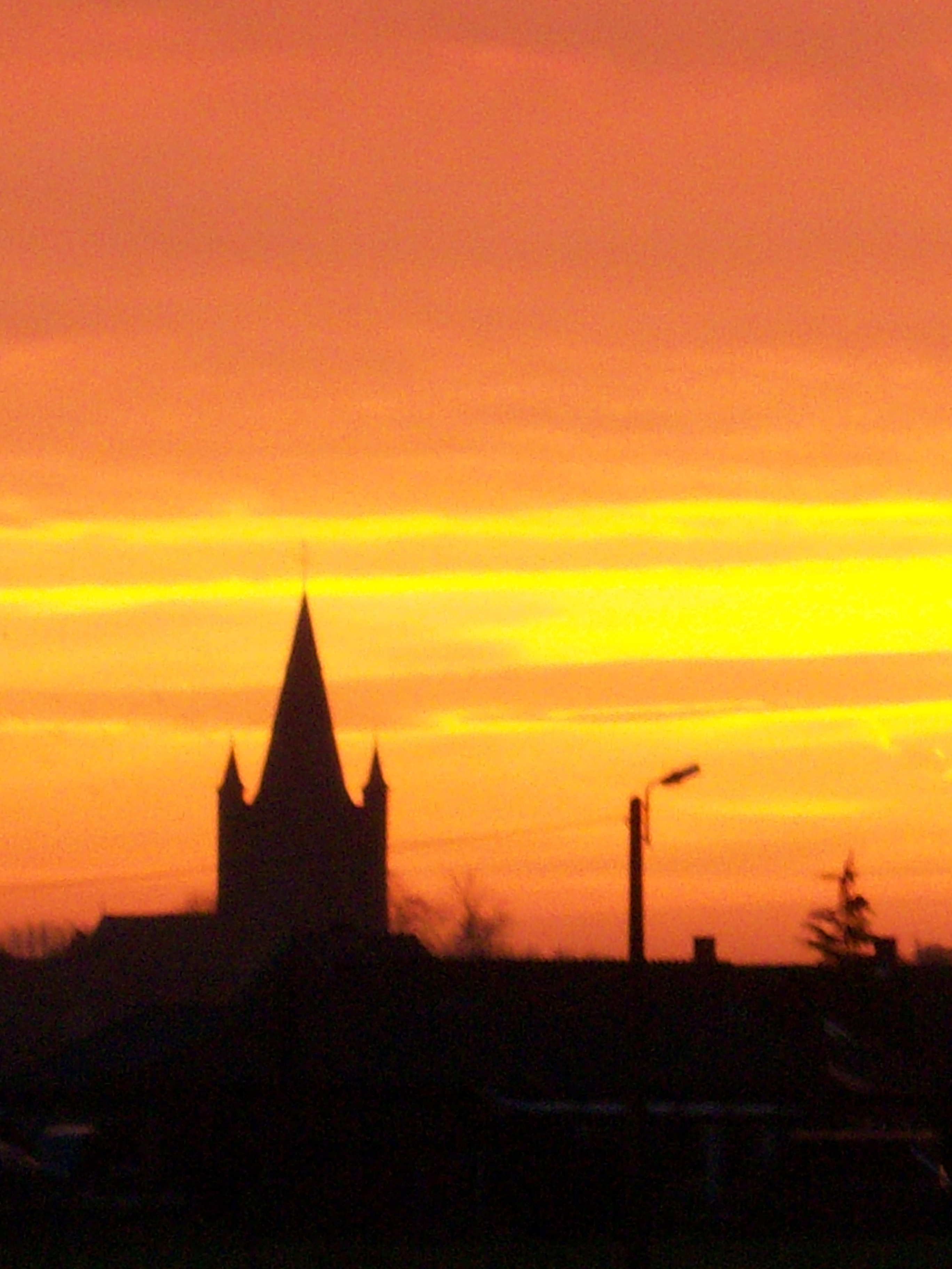 zicht op parochiekerk Herne